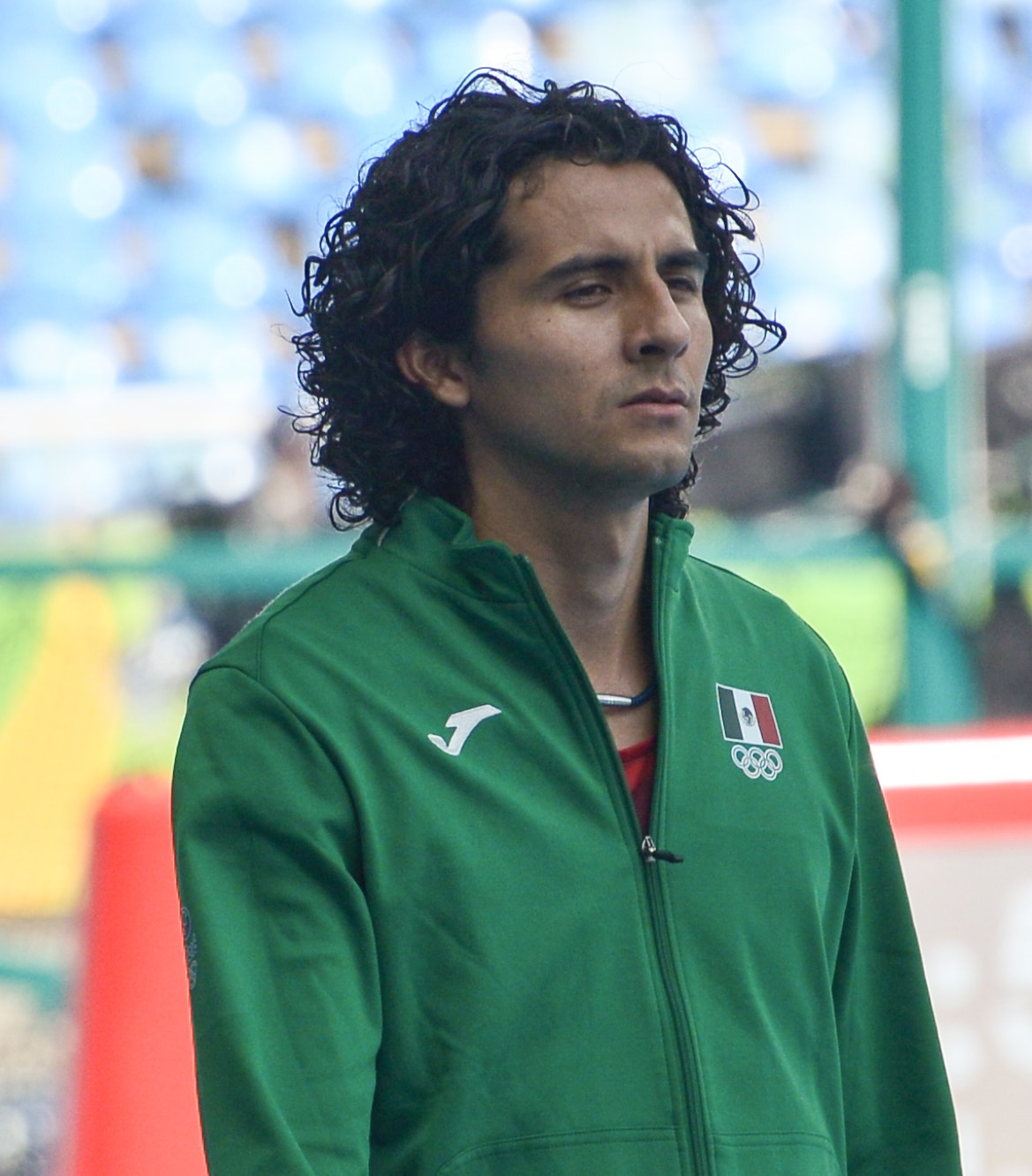 Alberto Álvarez en finale du concours du triple saut à Rio 2016